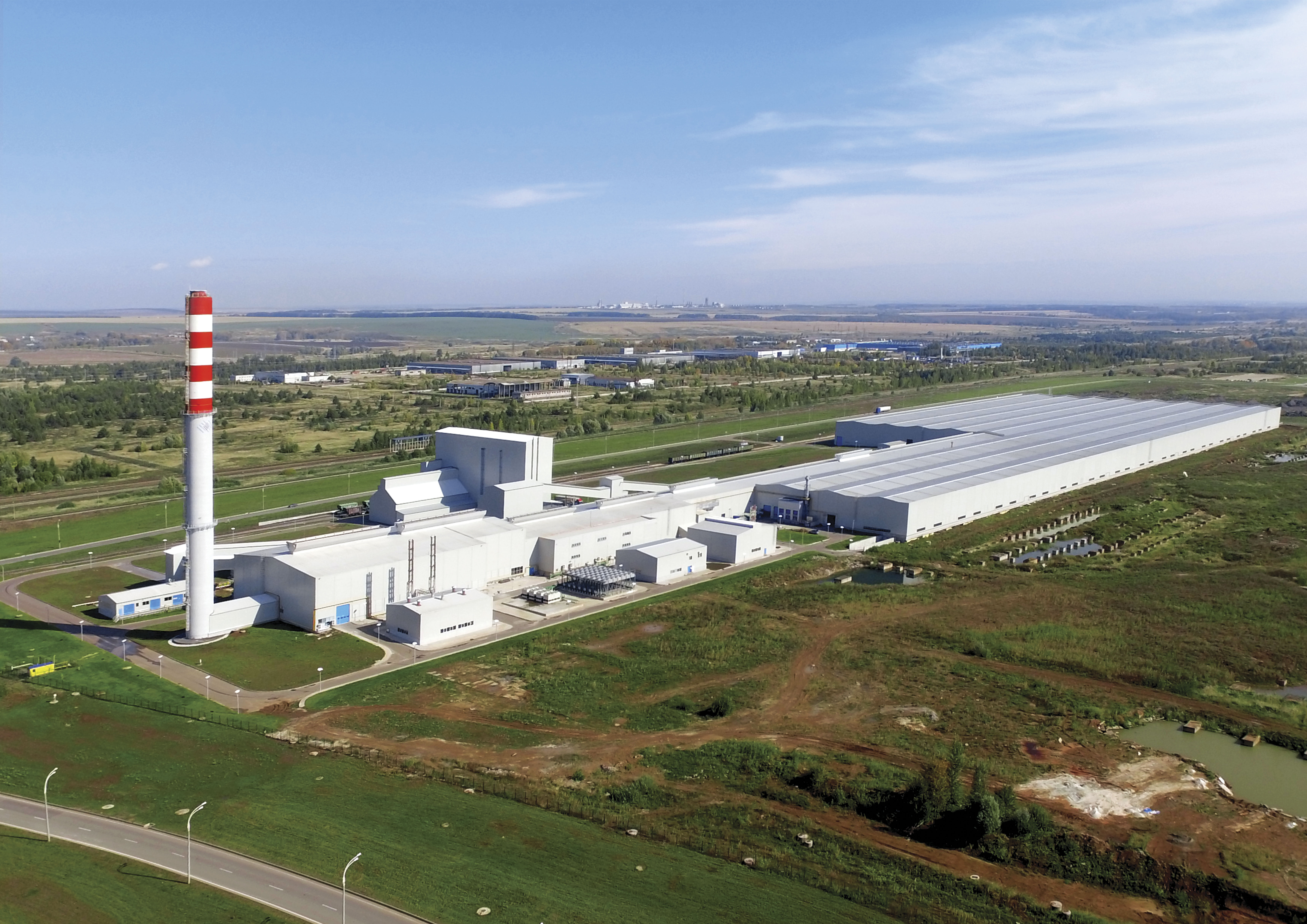 Особая экономическая зона «Алабуга», Завод «Тракья Гласс Рус»